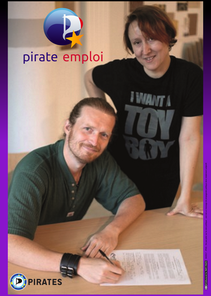 Parodie Politique fr